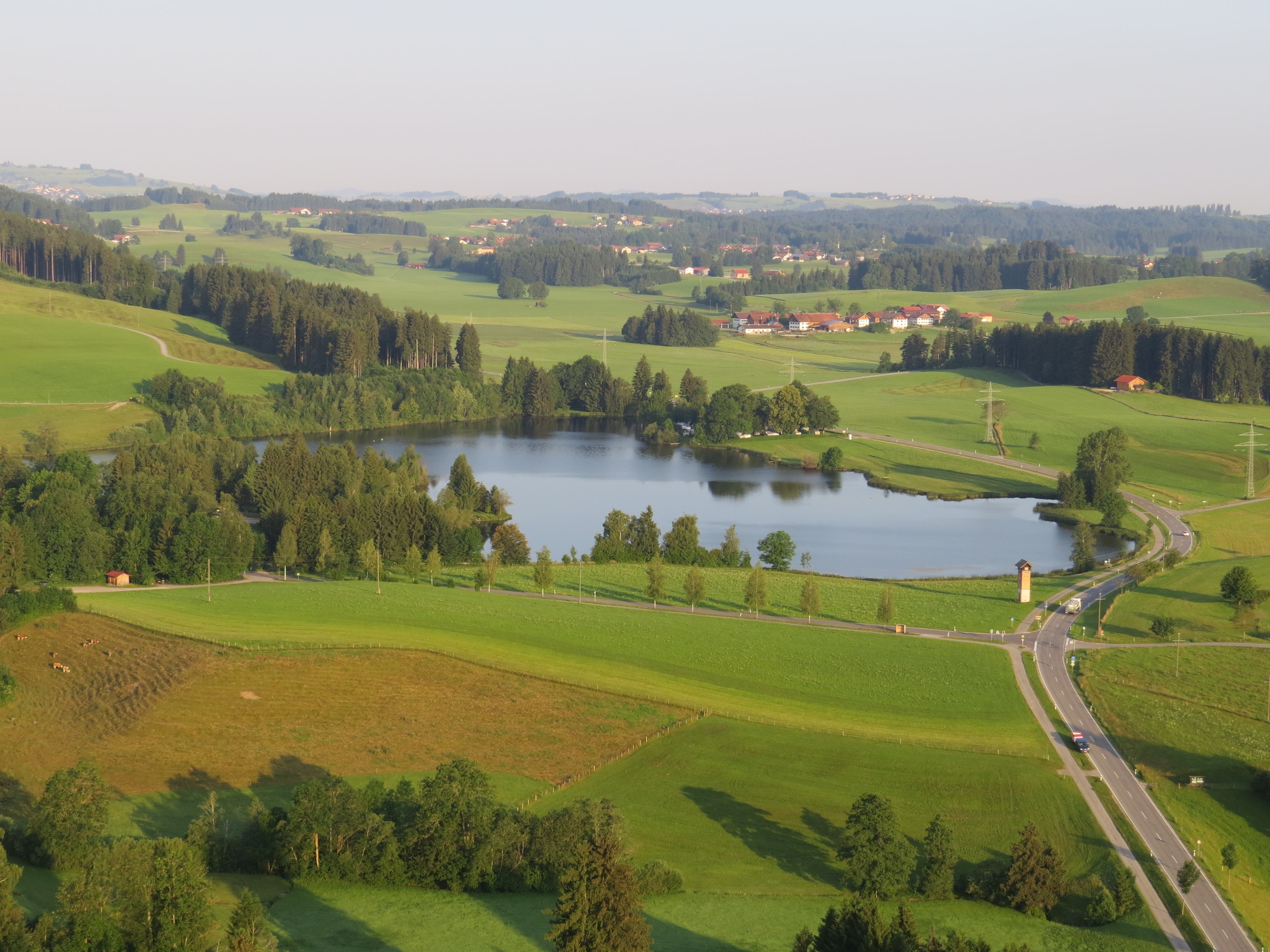 Schwaltenweiher von Osten, Rückholz